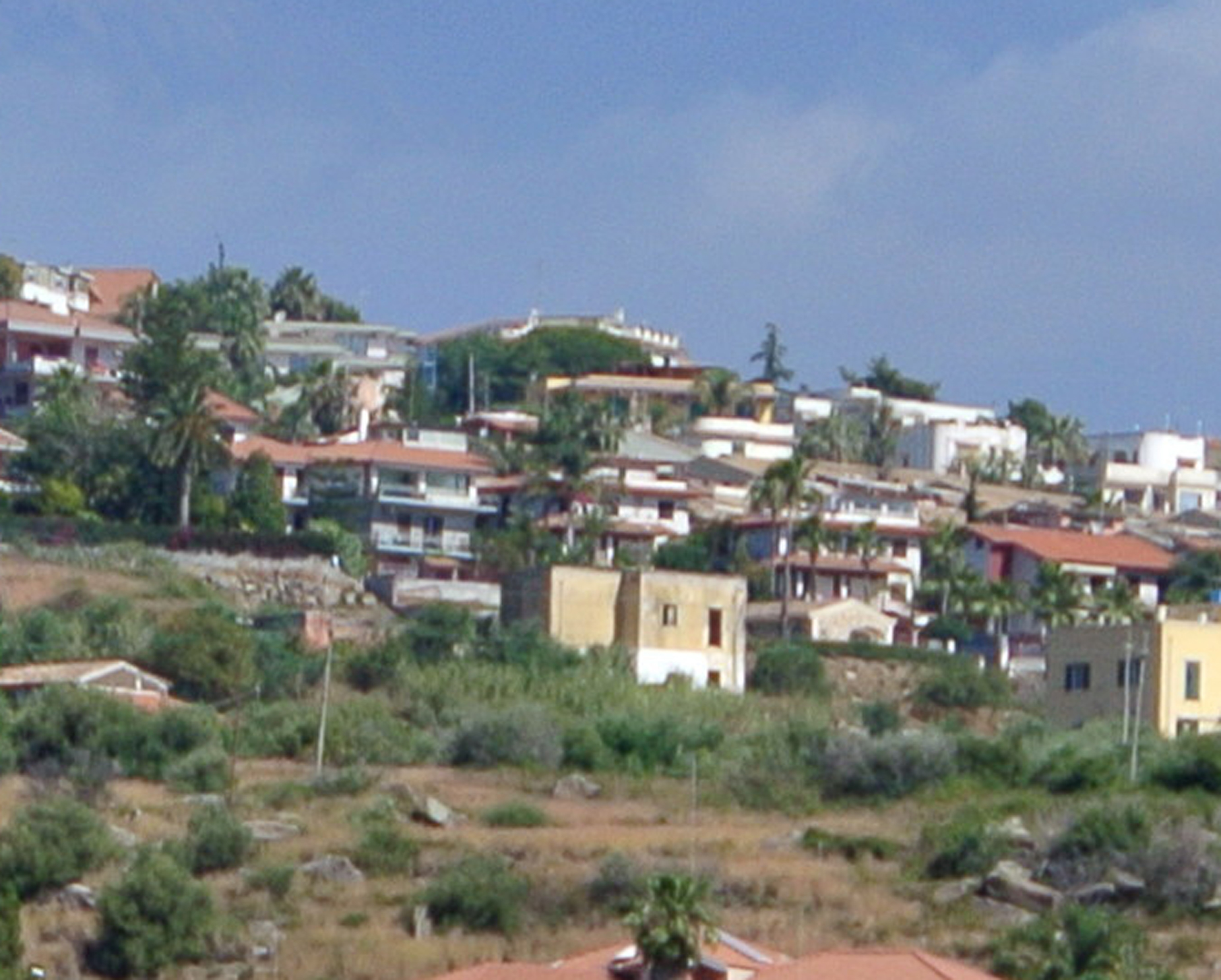 Fabbricato abbandonato della vecchia stazione ferroviaria di Aci Trezza